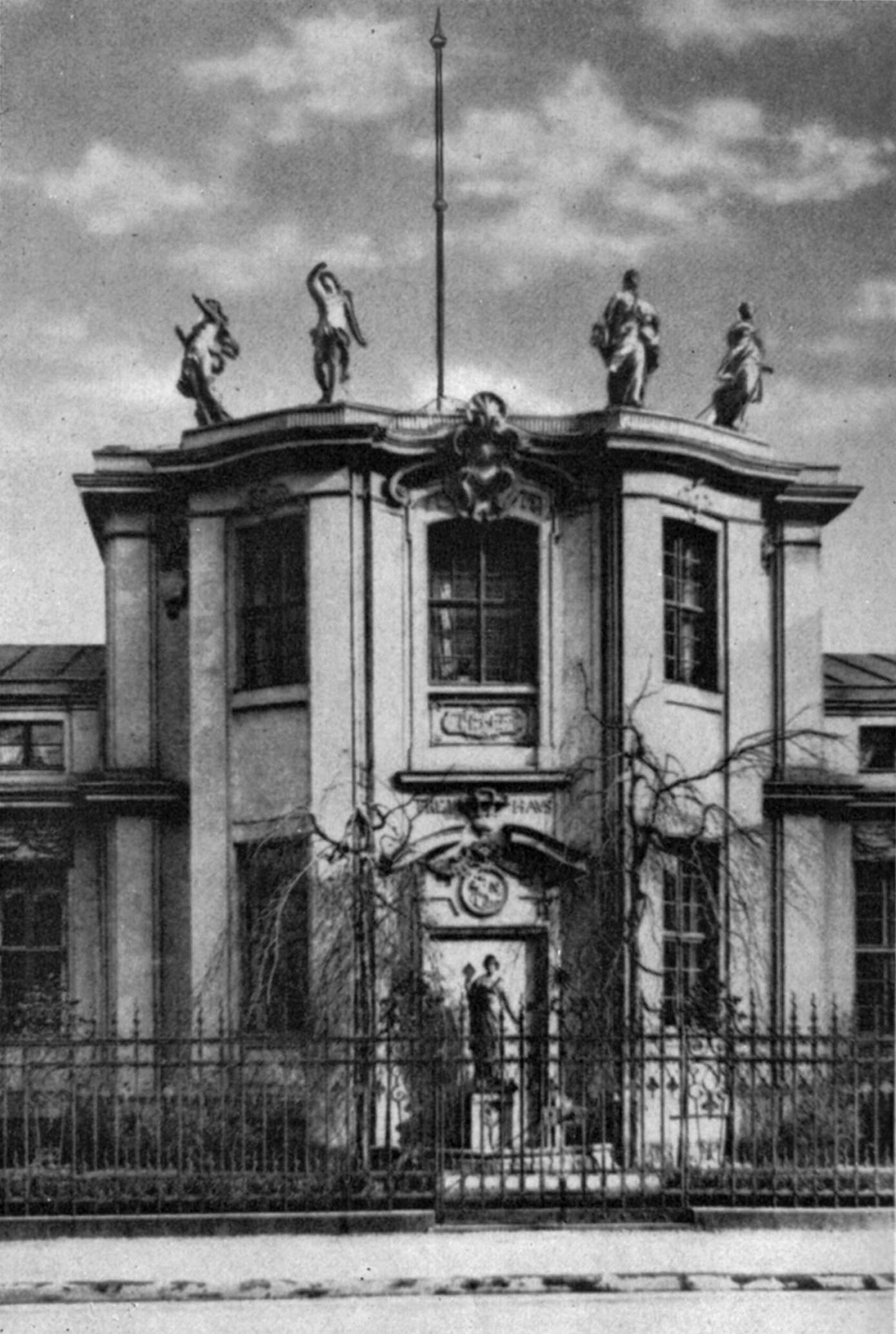 Palais von Kameke, Berlin, erbaut 1711-1712 von Andreas Schlüter